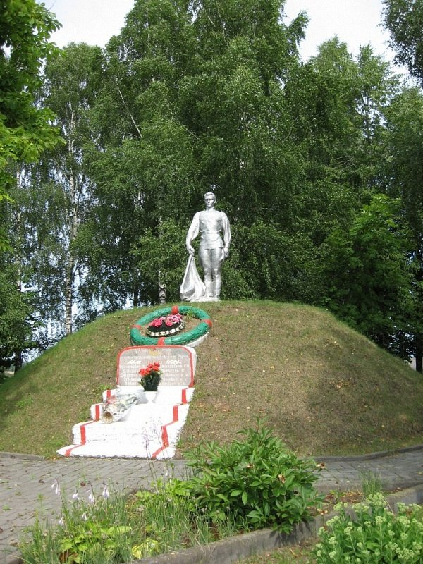 Граўжышкі. Помнік ВАВ